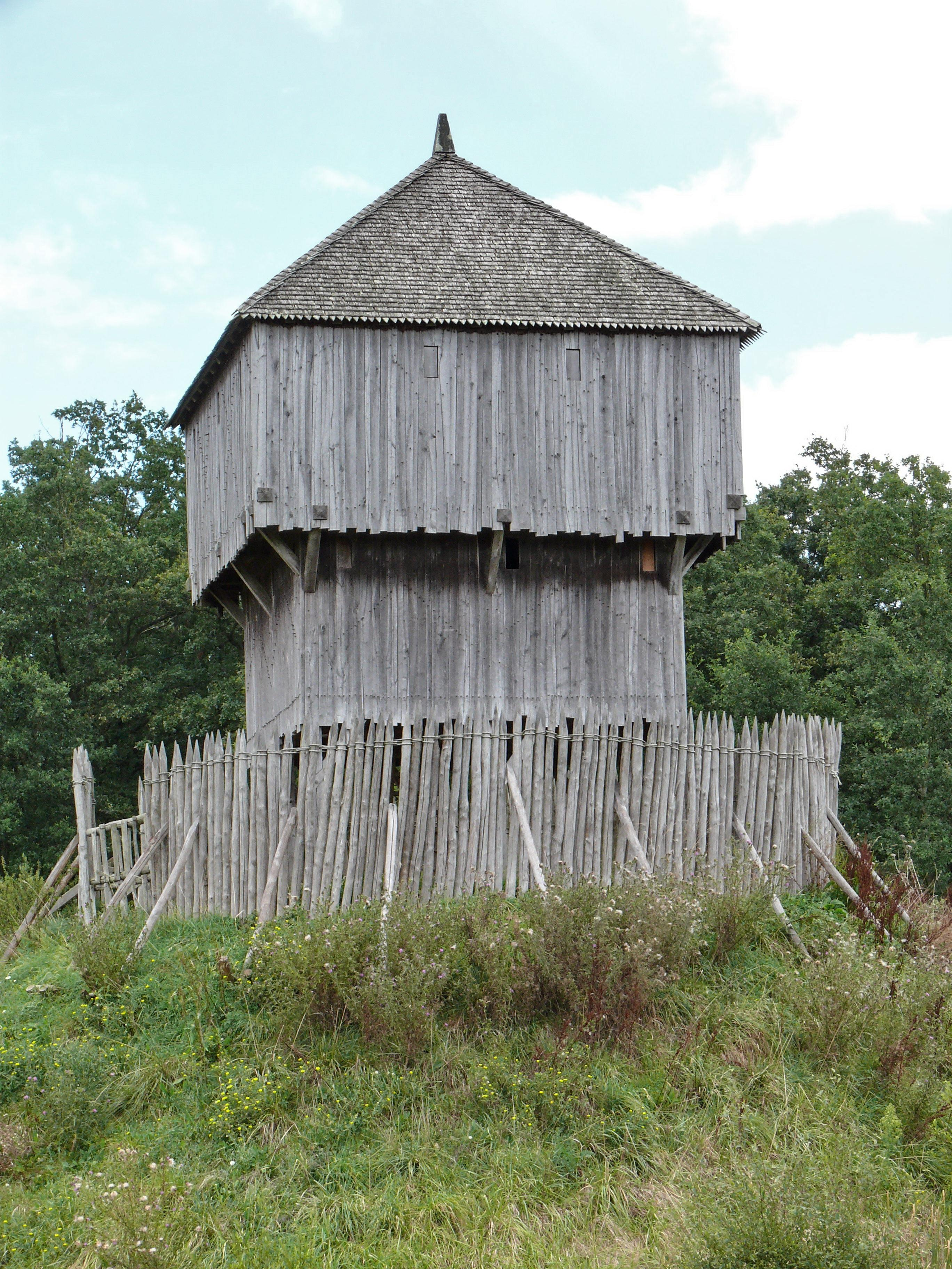 Le château à motte de Saint-Sylvain-d'Anjou (Maine-et-Loire, France).